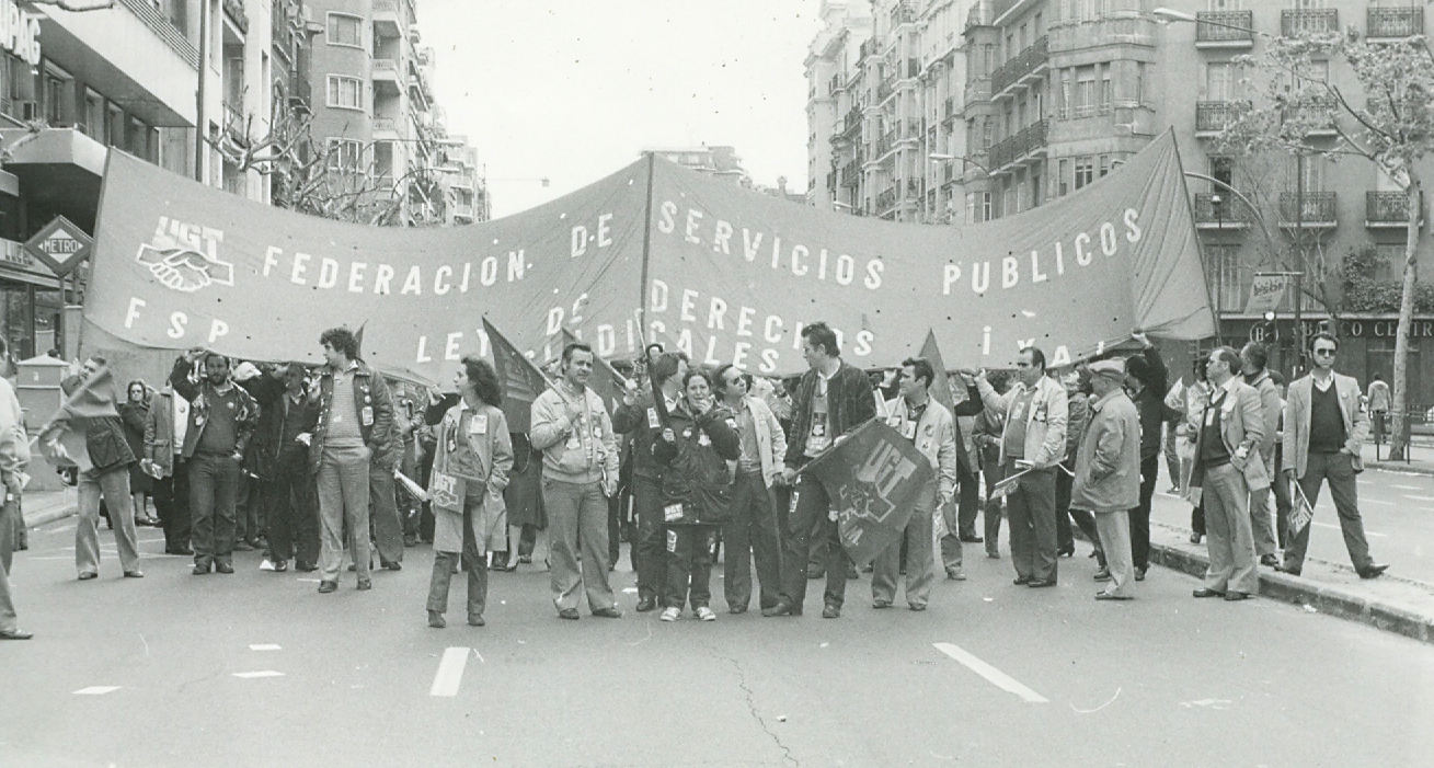 Manifestación de empleados públicos en Madrid (España) convocada por la Federación de Servicios Públicos de UGT en los años ochenta